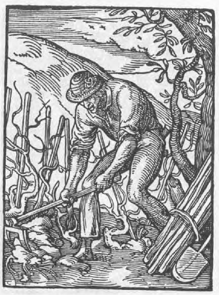 "Der Rebmann" aus Eigentliche Beschreibung aller Stände auf Erden (1568)